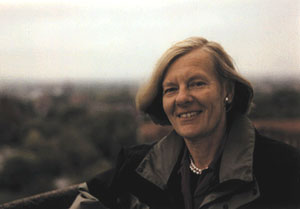 Astronomen Birgitta Nordström (fotograf: Björn Stenholm)